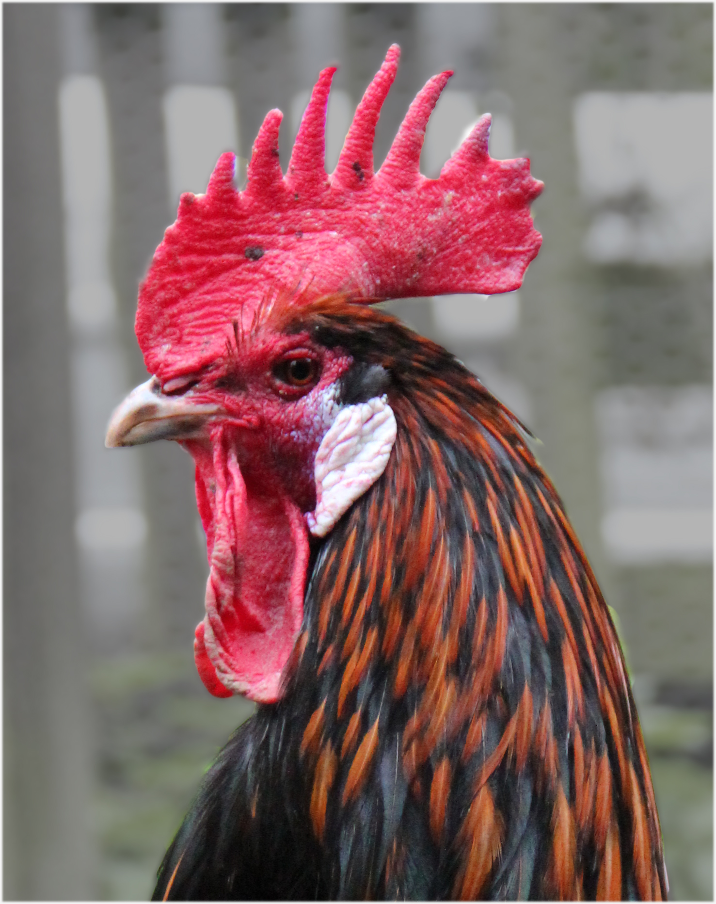 Kop van een Bergse kraaier